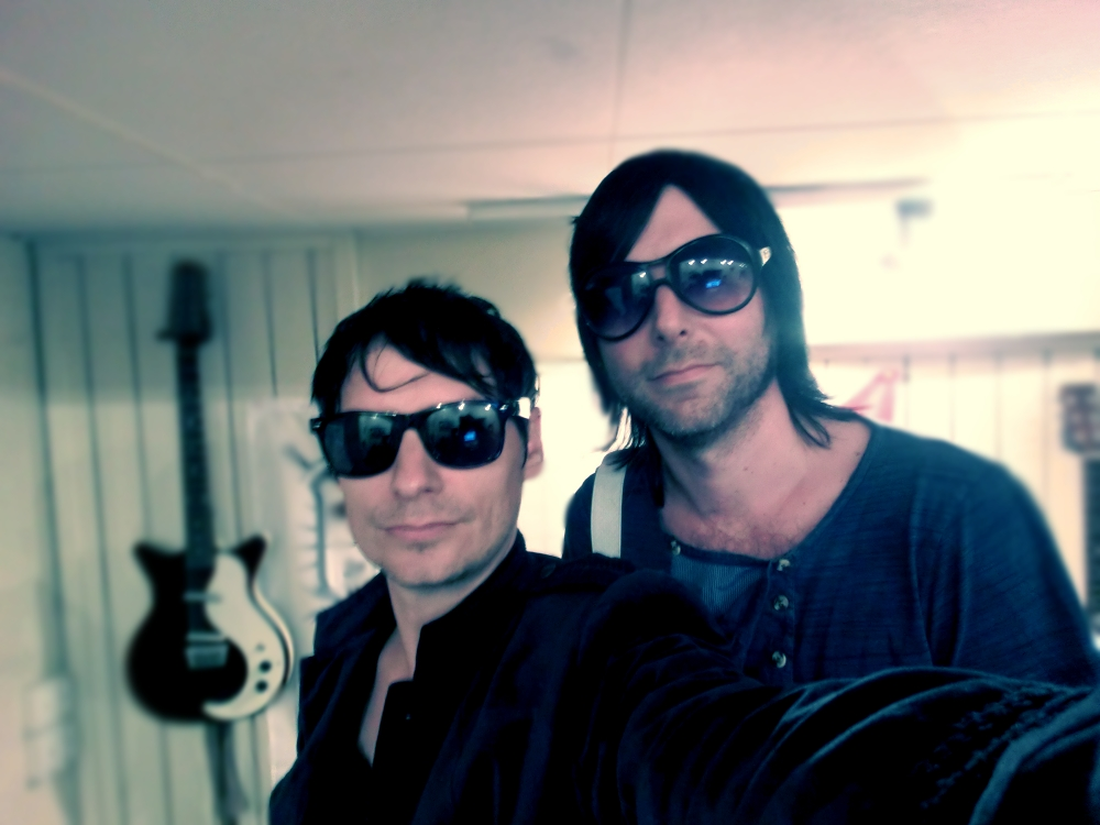 Daniel Bellqvist och Frederik Zäll (Eskobar) under albuminspelning 2012.